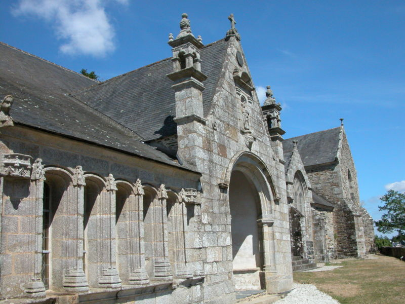 Chapelle Notre-Dame de Châteaulin. Au premier plan, l'ossuaire.